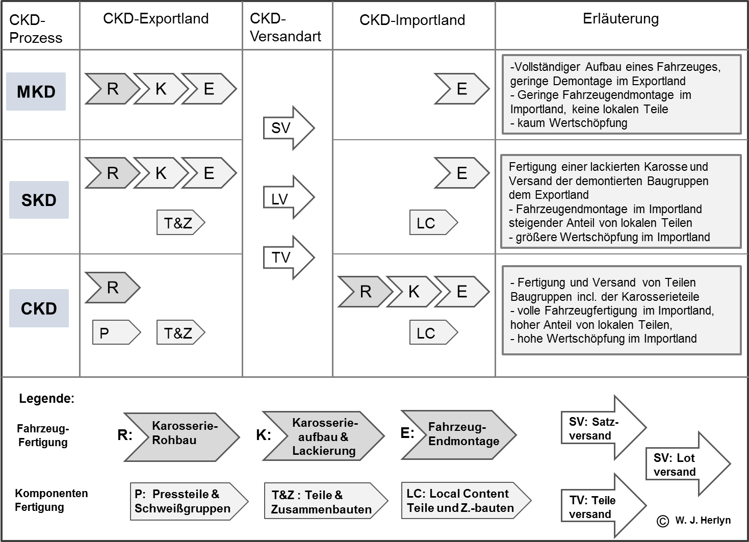 Die Grafik illustriert den Prozess und die unterschiedlichen Arten der CKD-Abwicklung